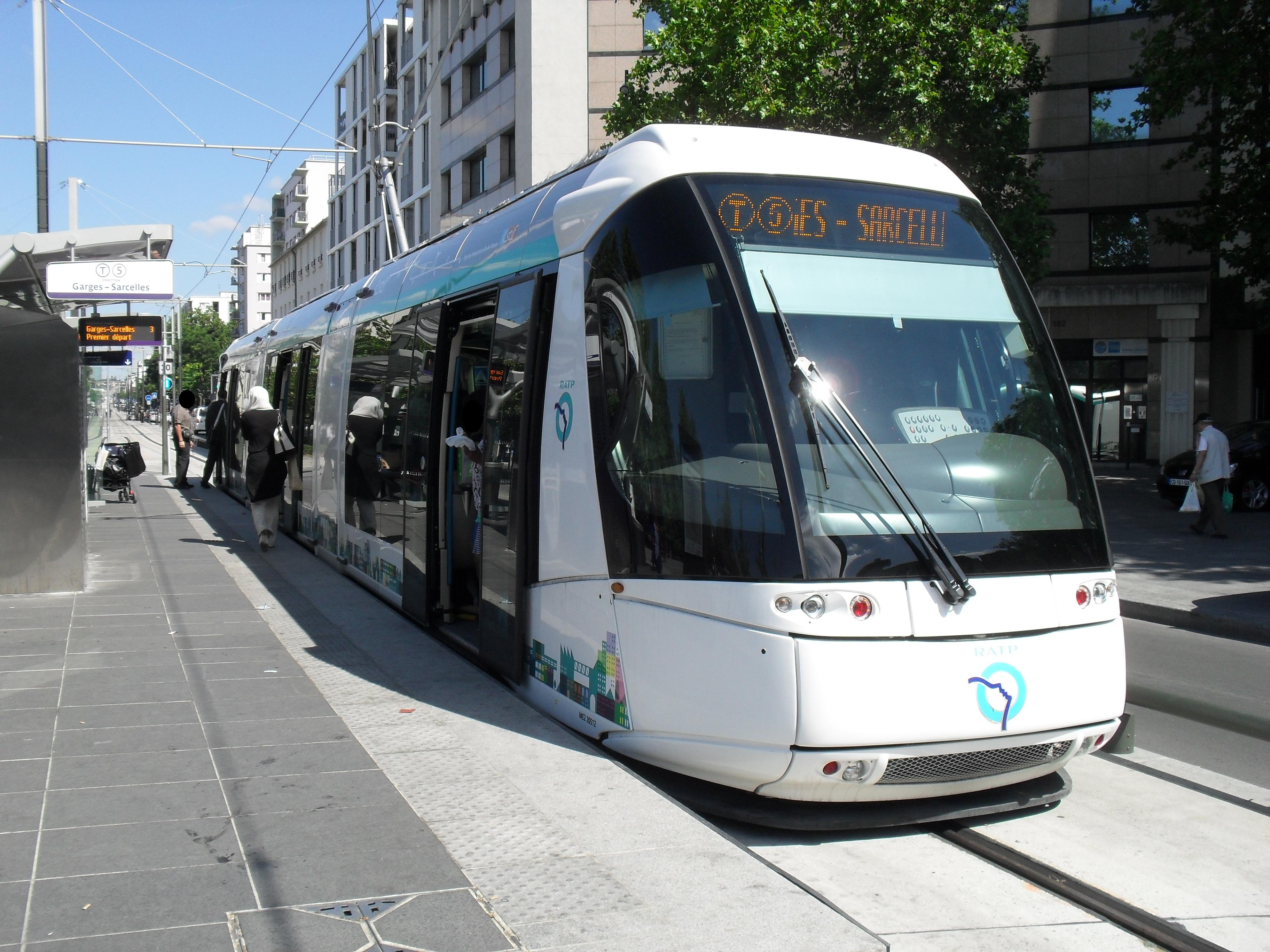 Une rame Translohr de la ligne T5 à la station terminus "Marché de Saint-Denis".